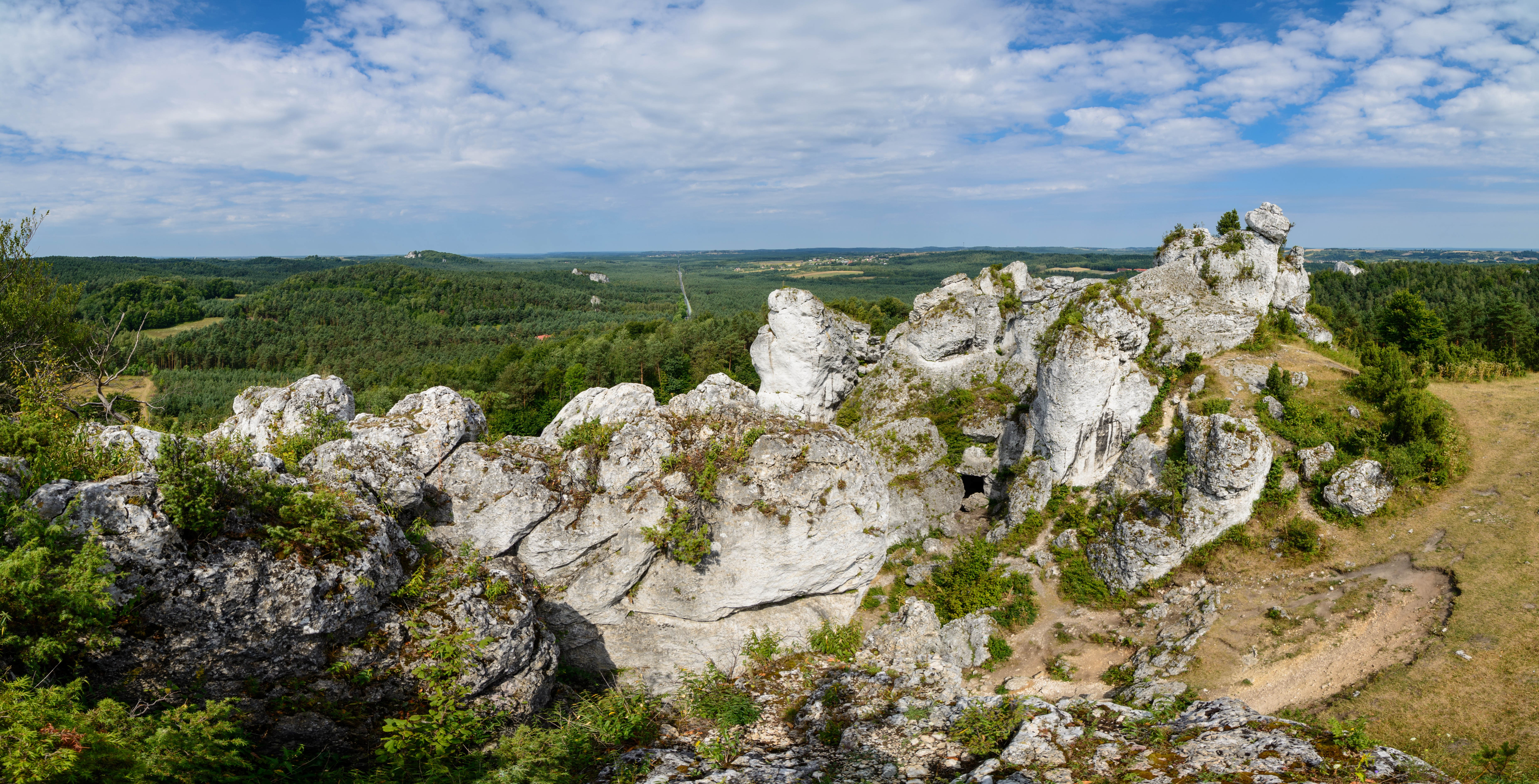 Formacje skalne w rezerwacie Góra Zborów.